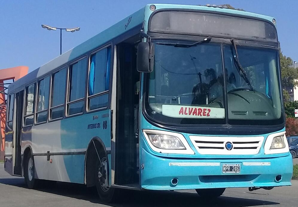 Interno 08 de la empresa Interbus, explotadora de la línea 298.